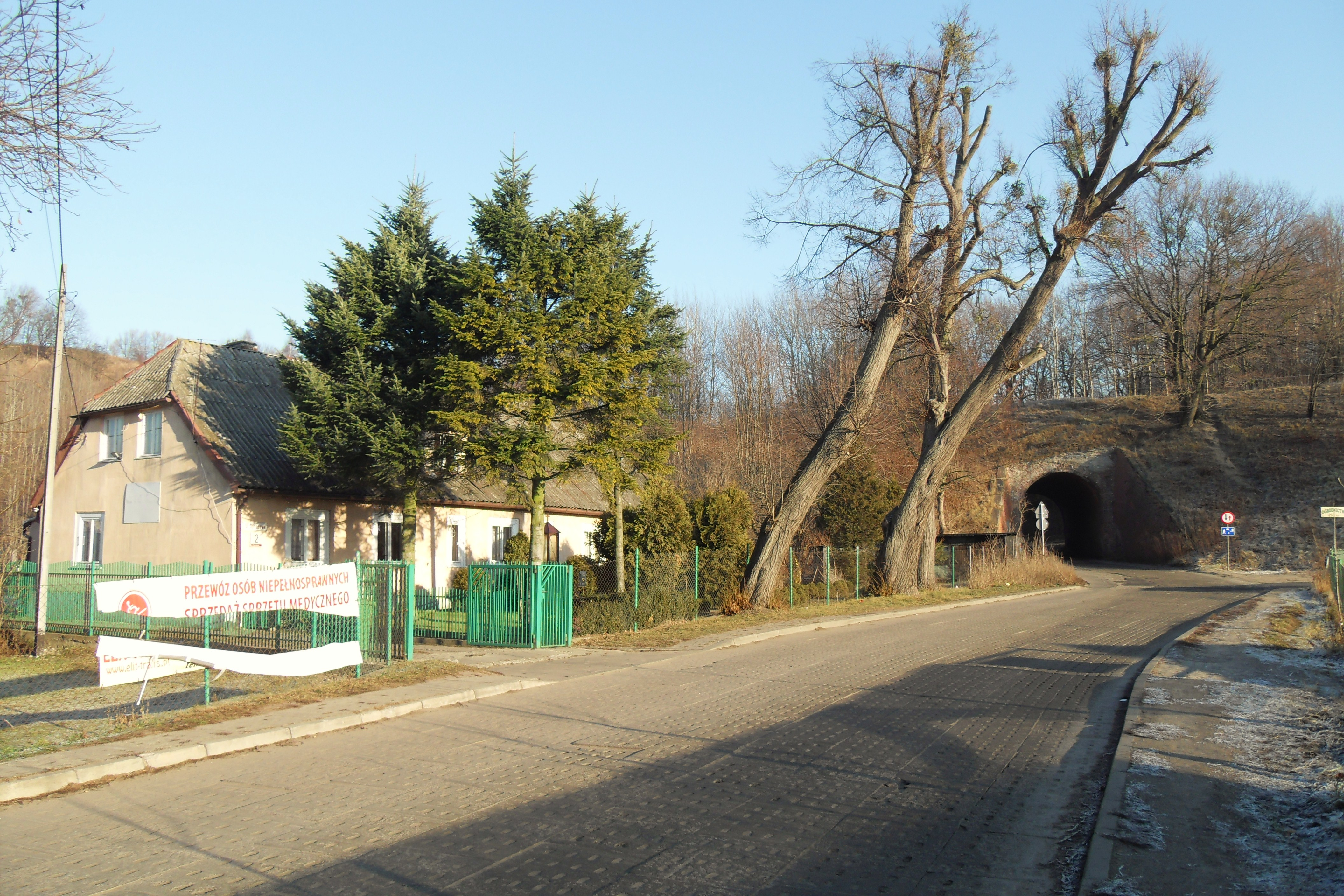 Gdańsk Brętowo, ul. Ogrodowa.